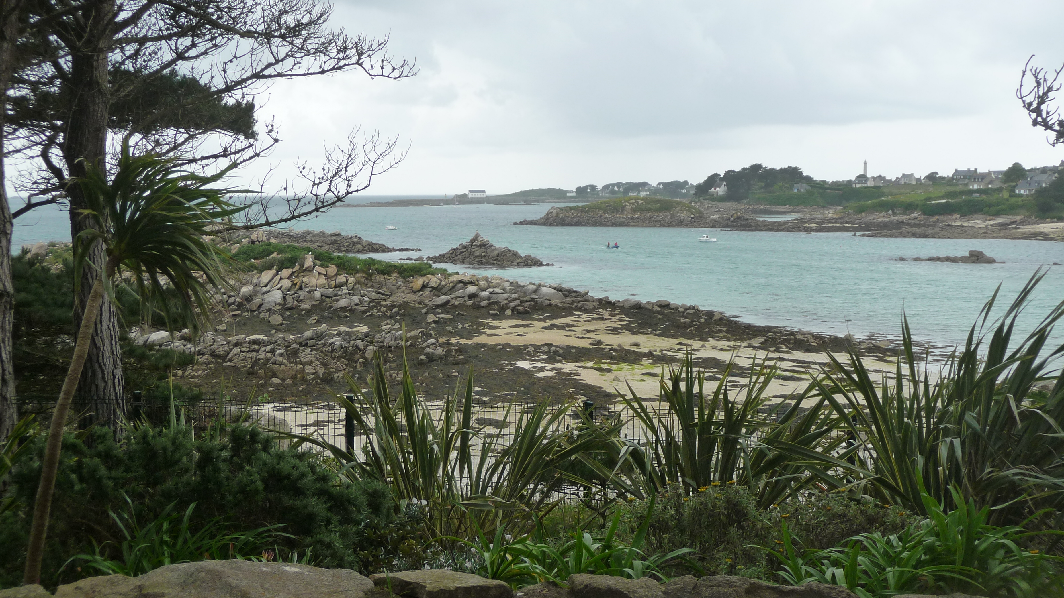 Île de Batz : baie du sud-est de l'île